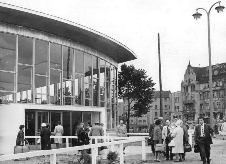 Zentralbild-Krueger We-Kt 6.7.1962 Die neue Zollabfertigung am S-Bahnhof Friedrichstraße ... wurde dieser Tage für den Grenzverkehr in Betrieb genommen. UBz.: Blick auf den Eingang der großen Glashalle.